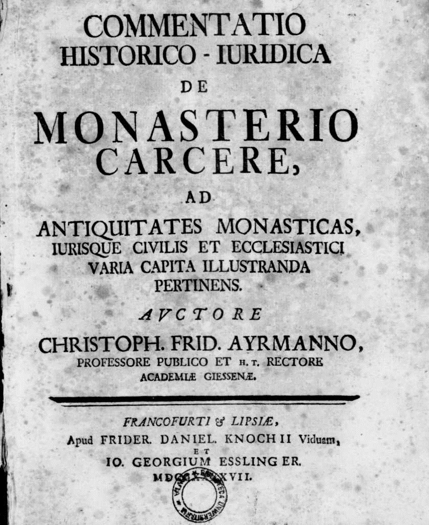 Frontespizio